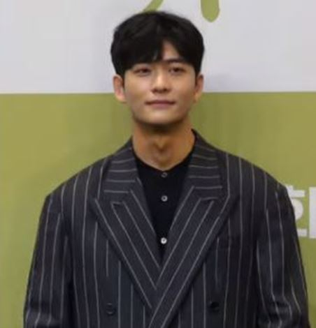 30일 오후 서울시 구로구 신도림 라마다서울신도림호텔에서 KBS '조선로코 녹두전' 제작발표회가 열려 배우 장동윤X김소현X정준호X강태오가 참석해 포토타임을 갖고 있다.